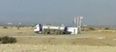 Taşpınar köyündeki Evsu şirketine ait kaynak suları dolum tesisi